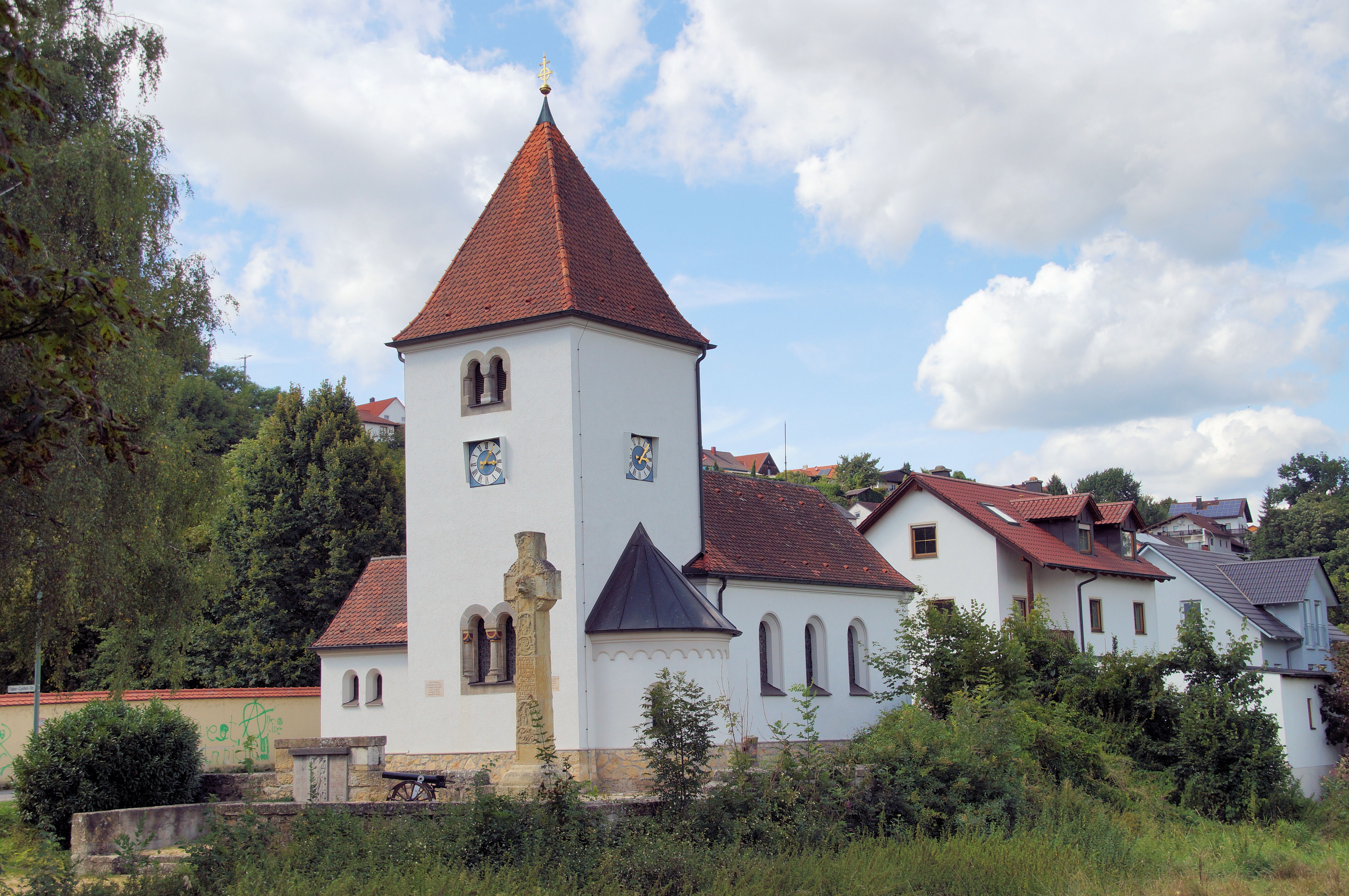 Kath. Filialkirche Hl. Dreifaltigkeit, Regendorf, Chorturmkirche mit Apsis, neuromanisch, 1907; mit Ausstattung; Kriegerdenkmal für 1914/18 in Form eines irischen Hochkreuzes, Muschelsandstein, 1924 von Max Roider, in Steinterrassenanlage südlich der Kirche